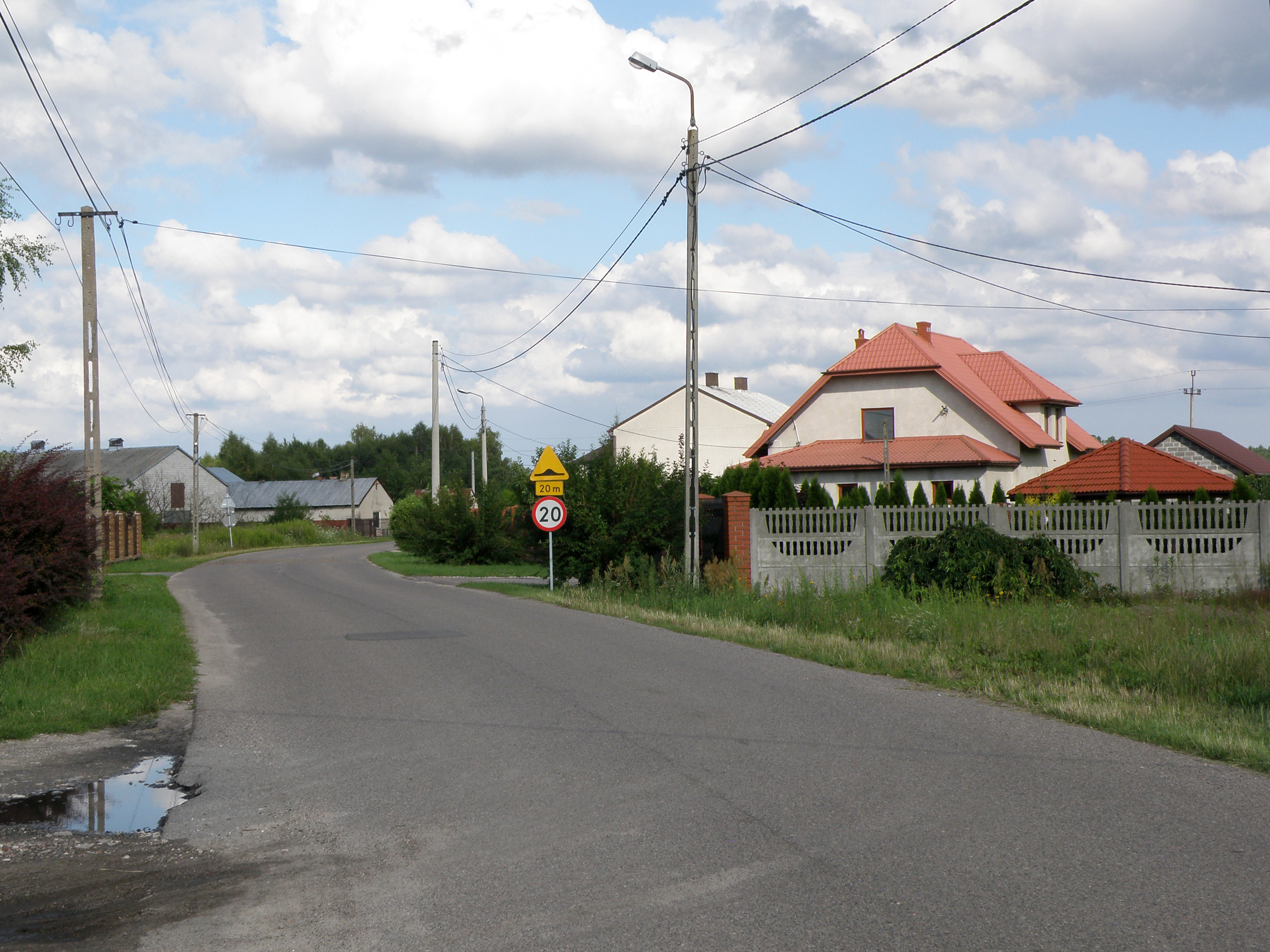 Krzaki Czaplinkowskie - województwo mazowieckie, powiat piaseczyński, gmina Góra Kalwaria.